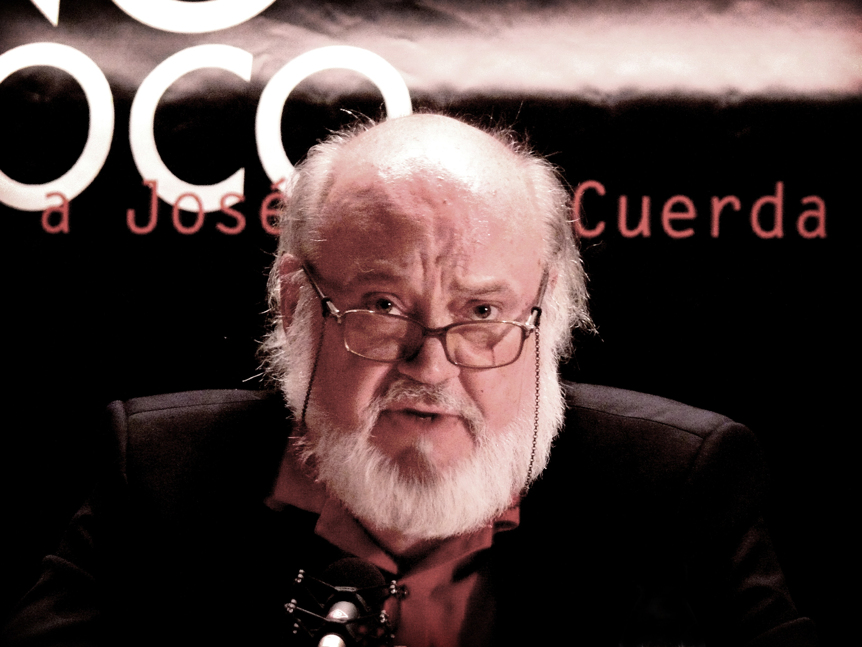 José Luis Cuerda, director de cine español.